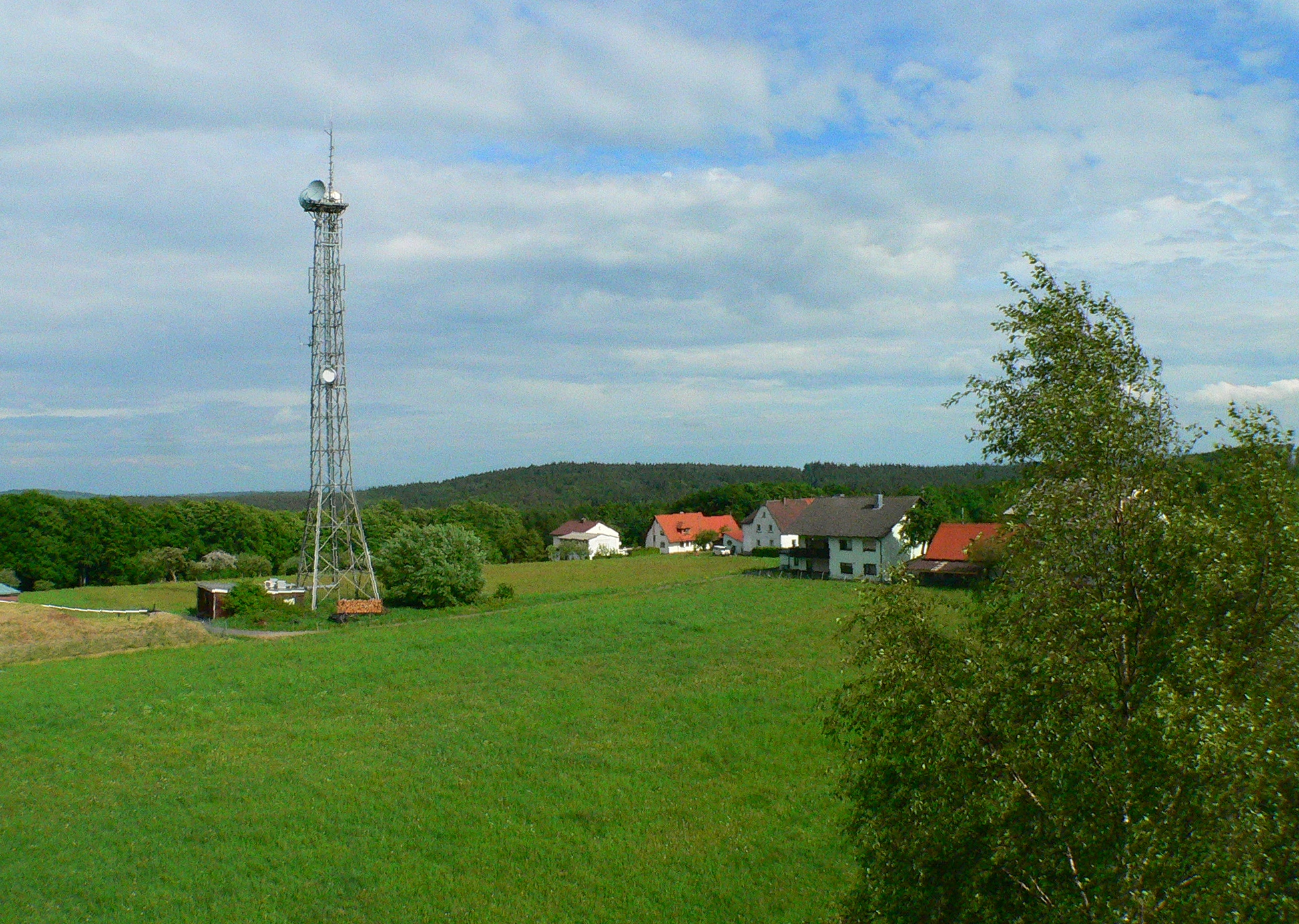 Sendeanlage auf der geishöhe (Oberwintersbach), Spessart